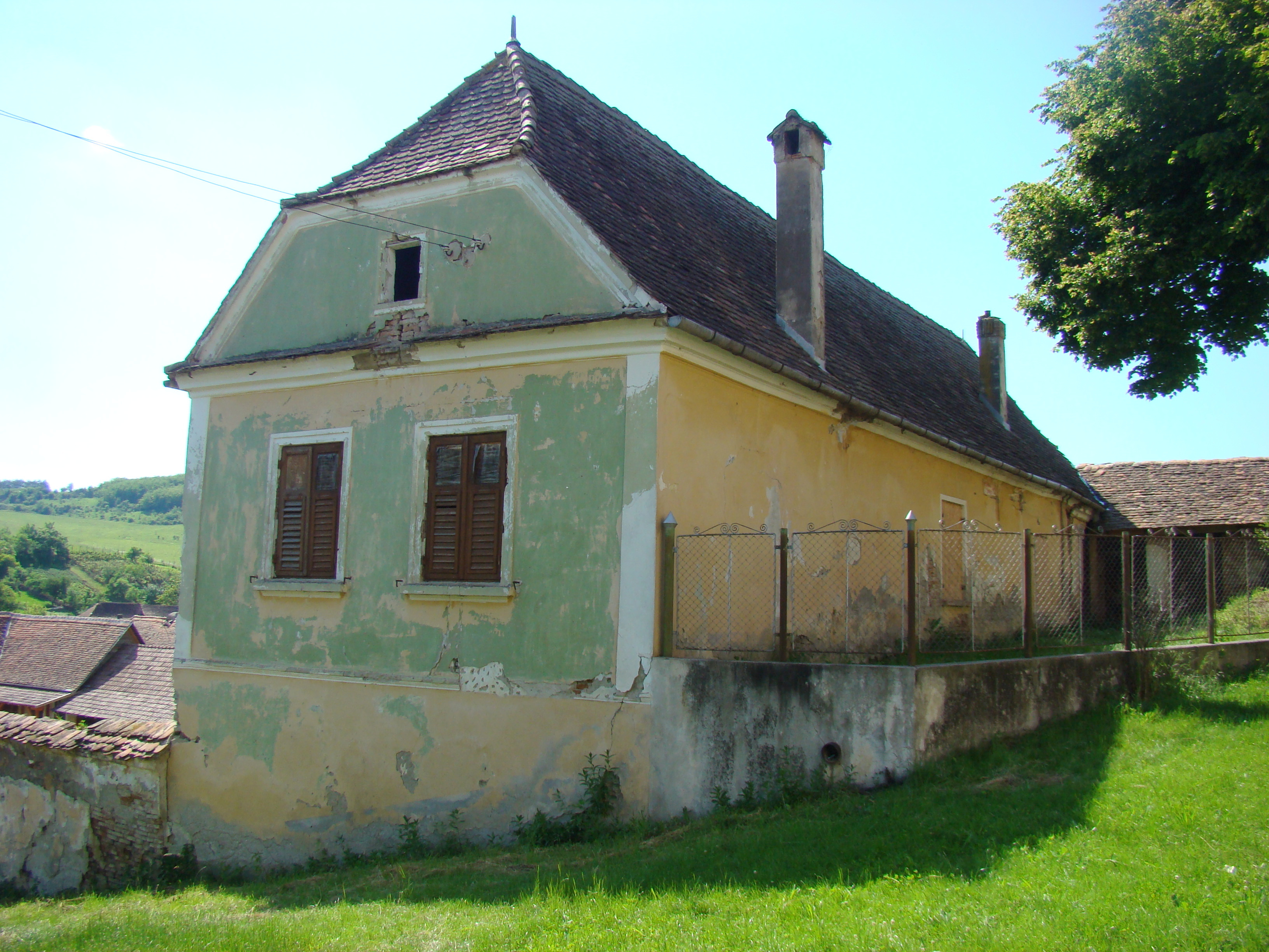 Casa parohială, sat Filitelnic; comuna Bălăușeri 03